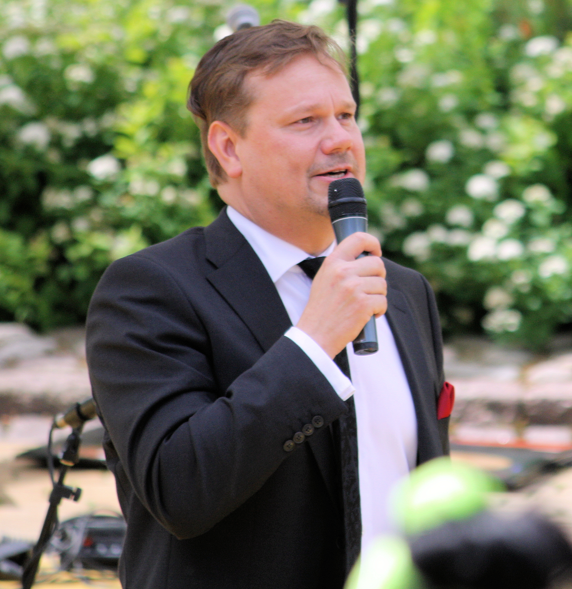 Kaupunginjohtaja Petri Härkönen – Keravapäivä 2013